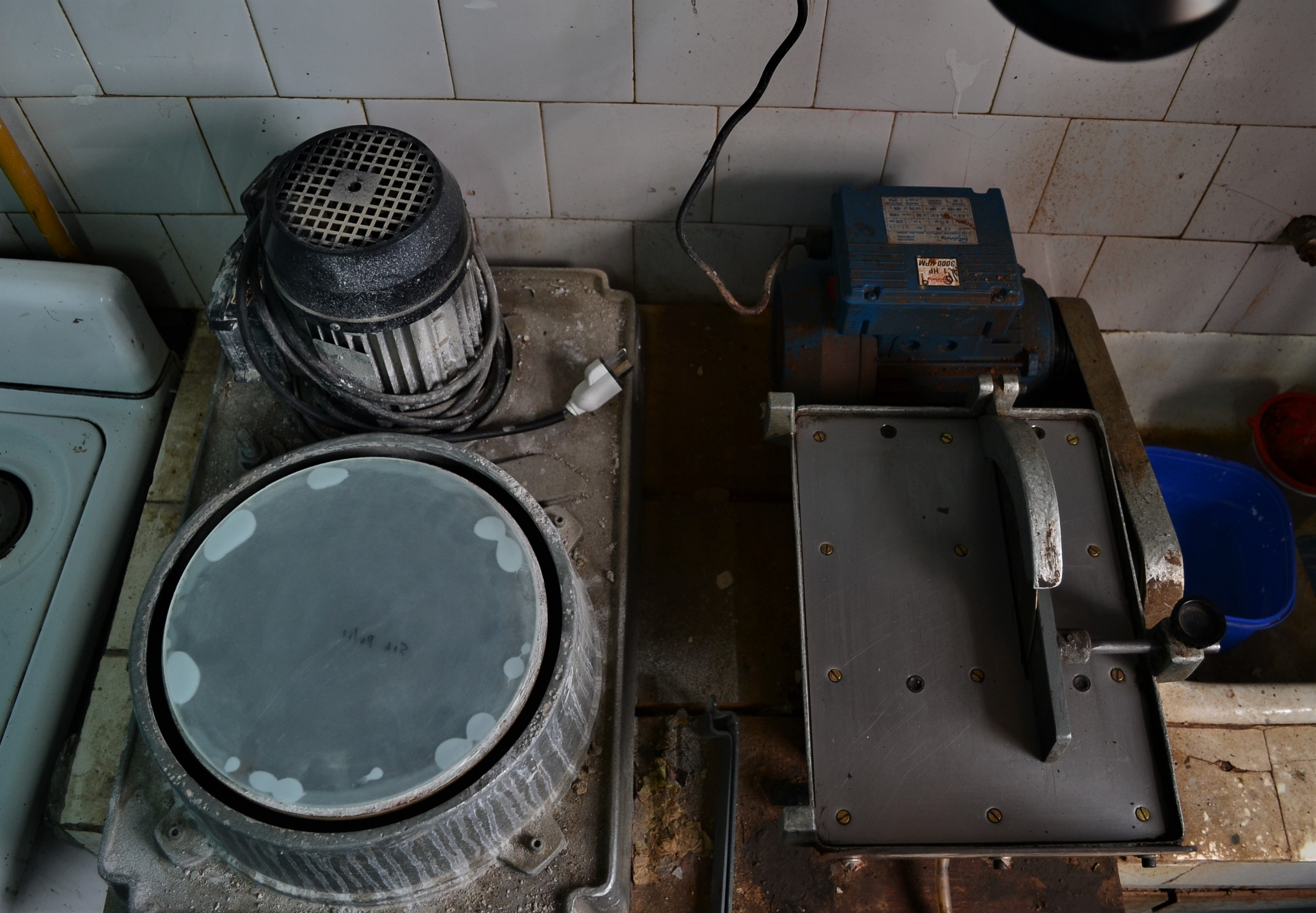 Equipamiento empleado en la preparación de cortes petrográficos en el laboratorio de cortes delgados del Museo Provincial Carlos Ameghino (Cipolletti, Río Negro). En la foto se observa una cortadora equipada con un disco diamantado (derecha